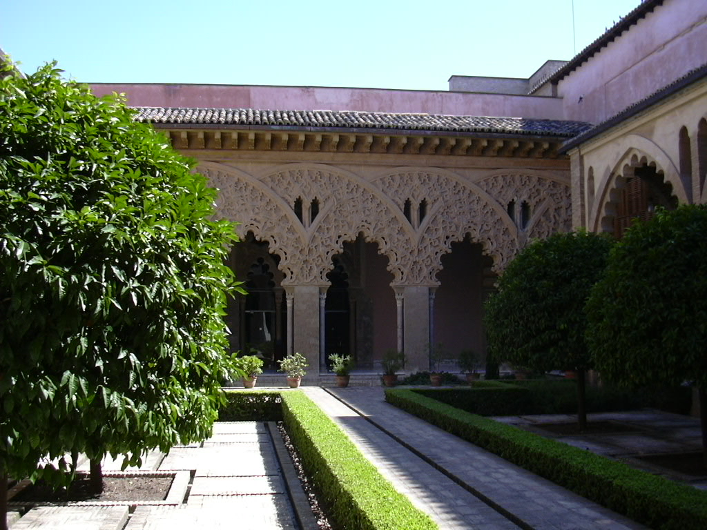 La Aljafería - Patio de Santa Isabel